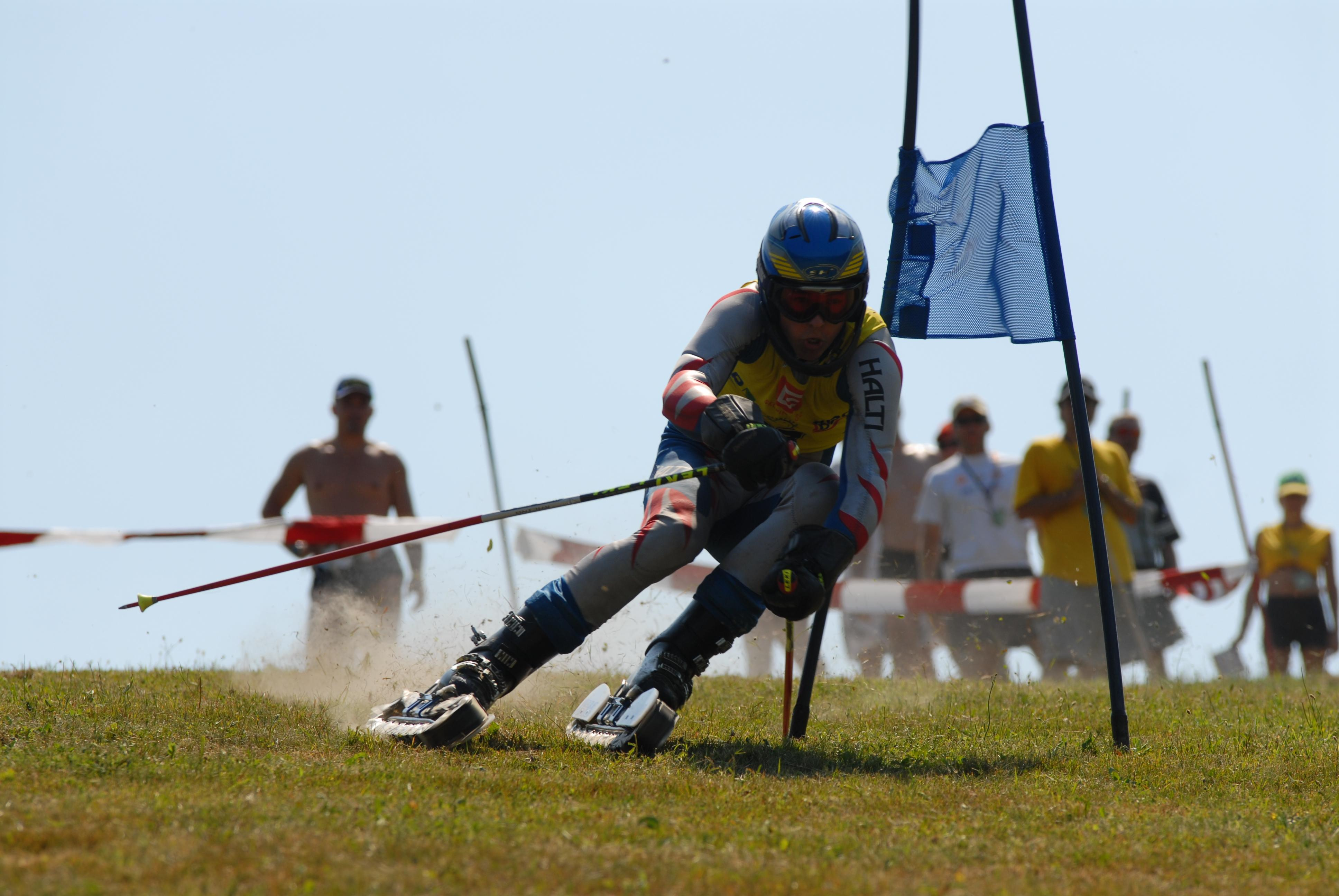 MSJ Opava